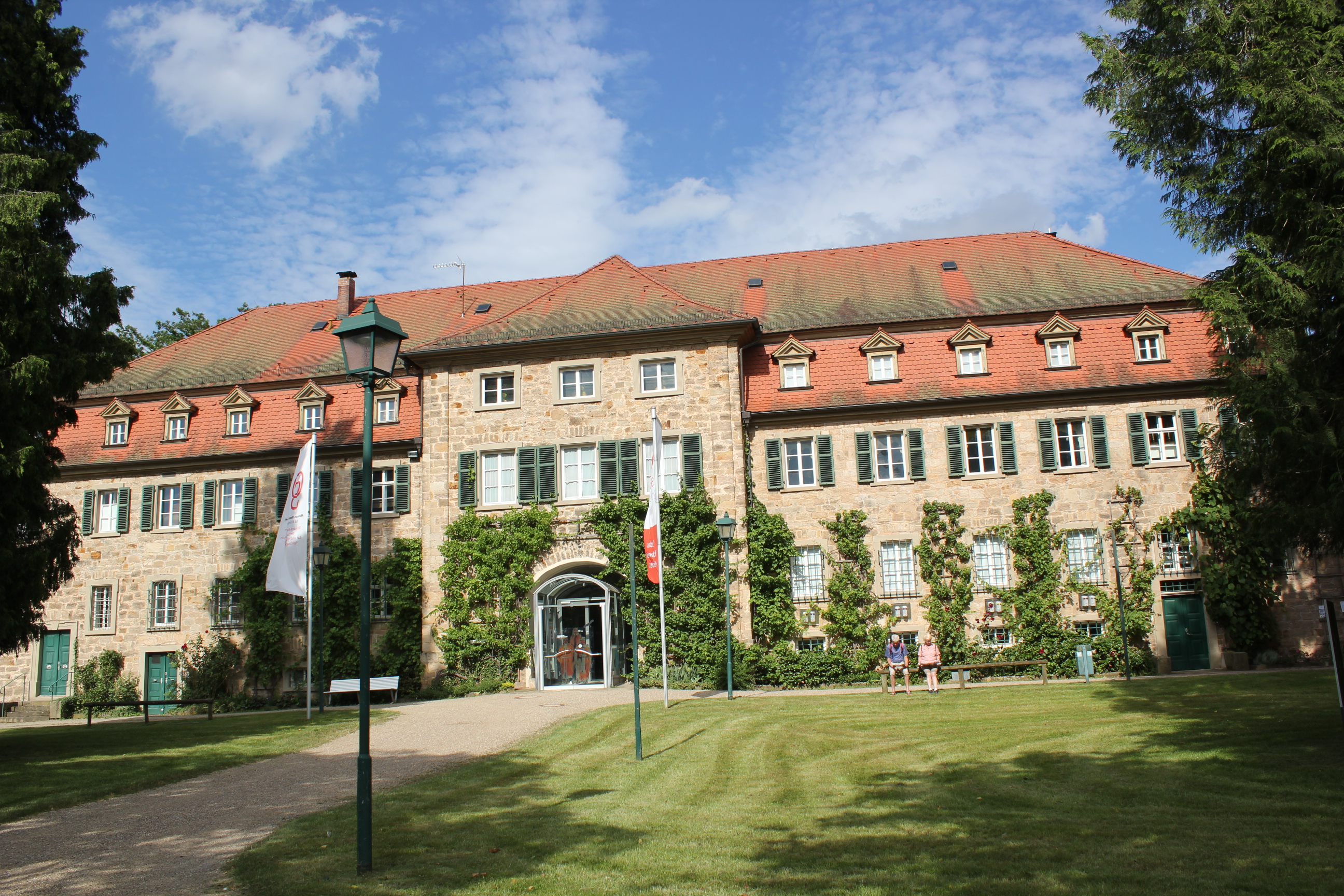 Außenansicht des Museums Obere Saline (Gartenseite)